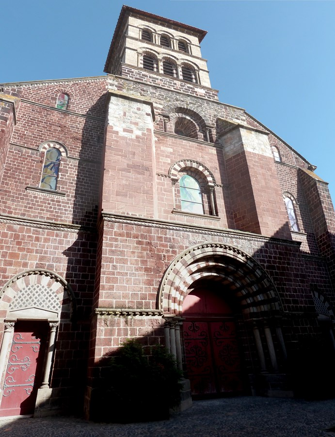 Façade de la basilique St Julien - Brioude - France